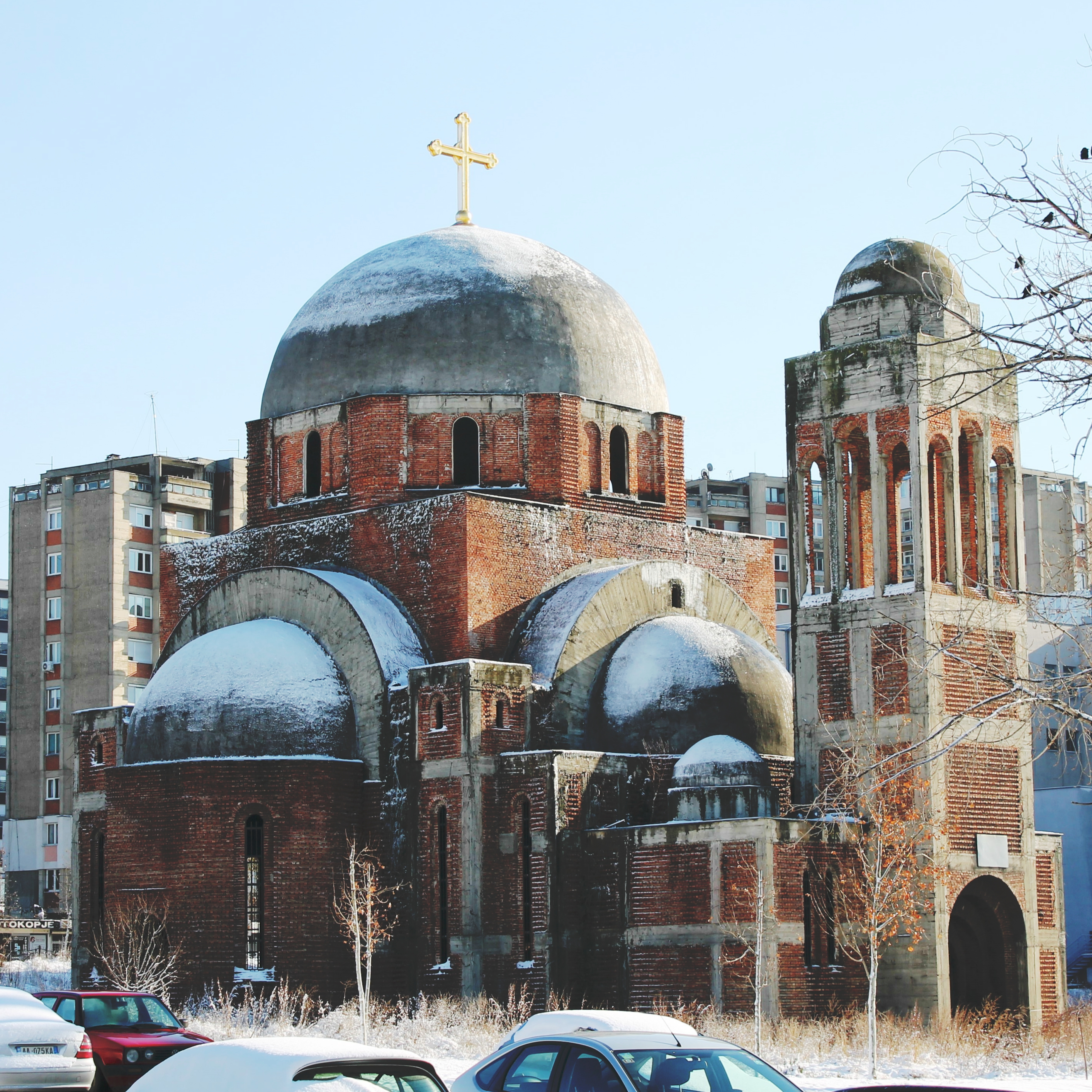 Tempulli Ortodoks në Prishtinë